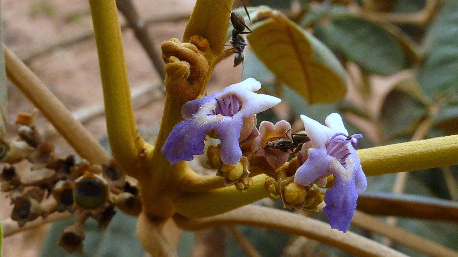 Vitex hypoleuca Schauer